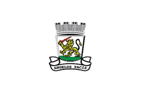 Bandeira de Simões Filho, município de Bahia, Brasil.